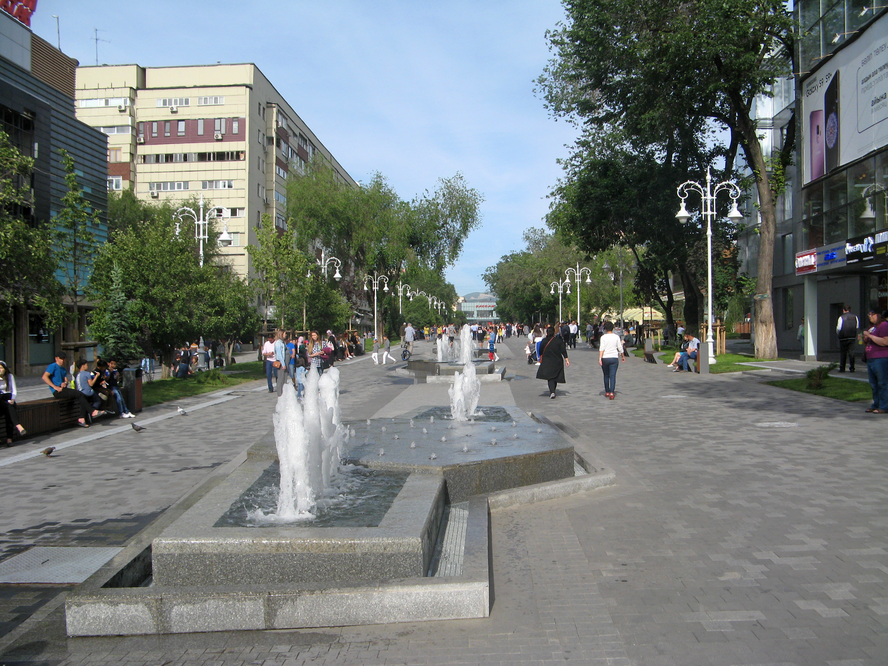 Улица Жибек Жолы, Алма-Ата